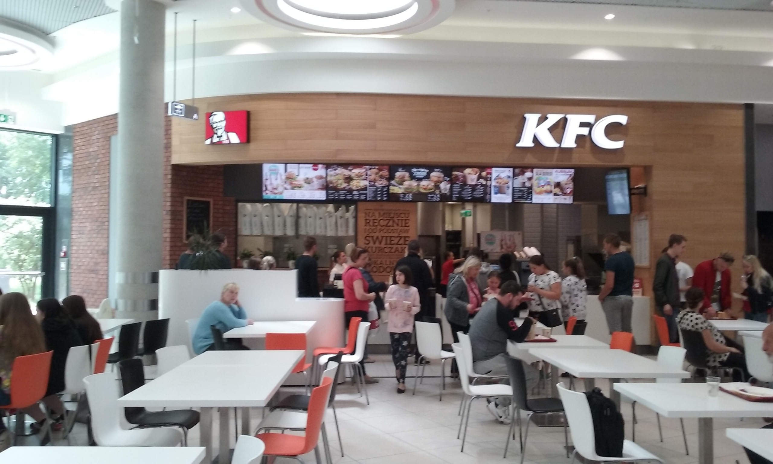 Restauracja KFC w sześćdziesięcio tysięcznym Tomaszowie Mazowieckim w województwie łódzkim. Galeria "Tomaszów"